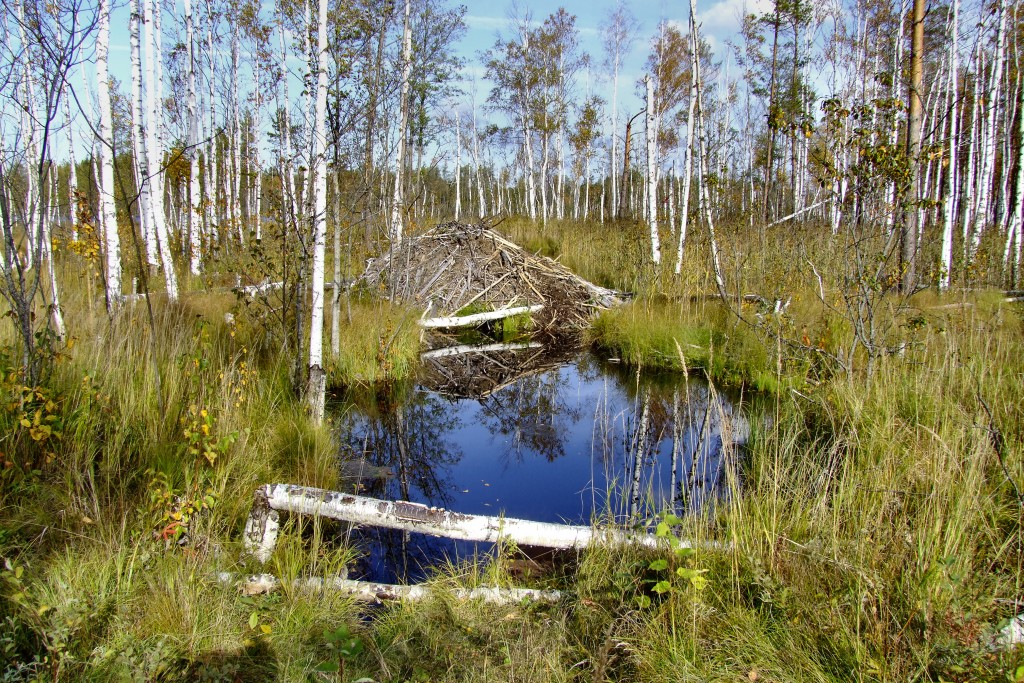 Teiču purvs